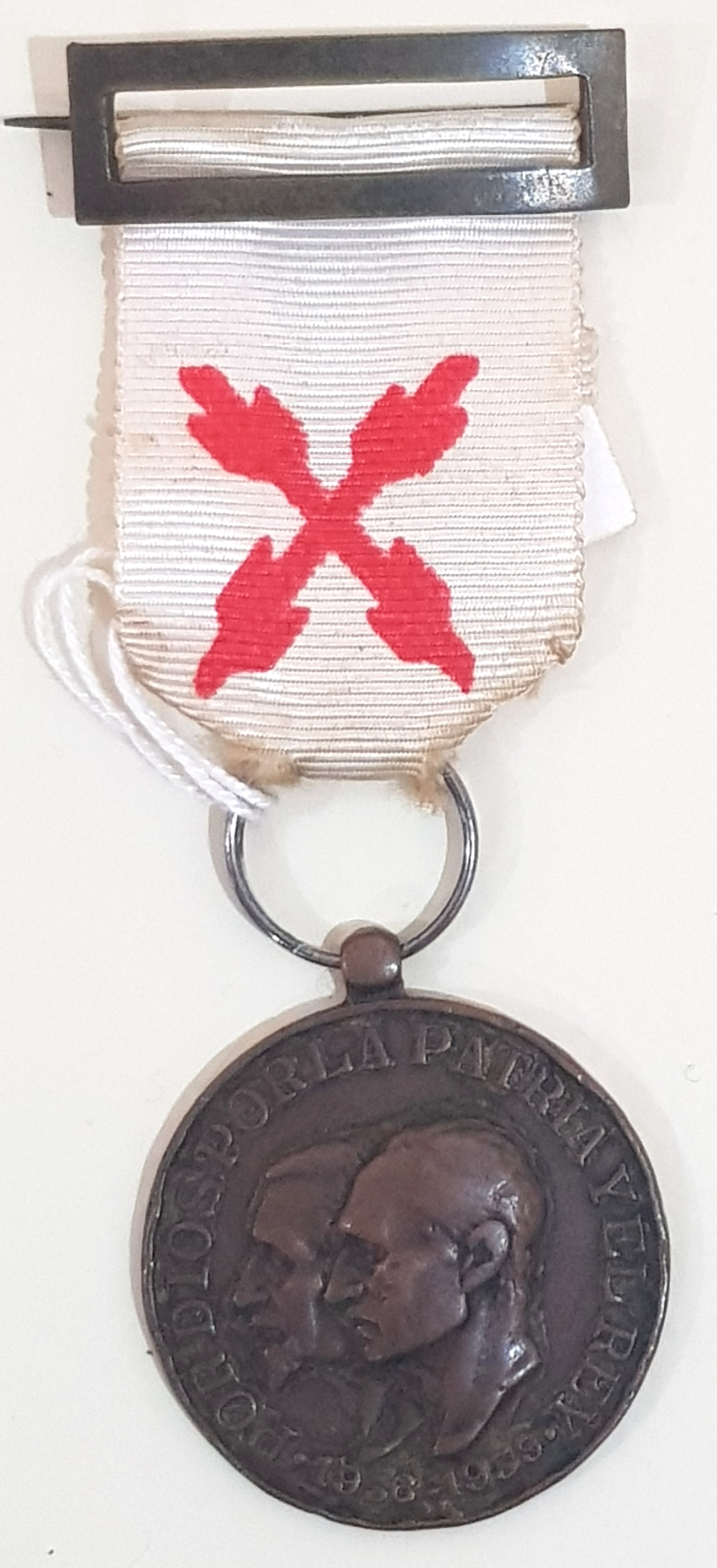 Loyalitätsmedaille 1964 verliehen vom spanischen Thronprätendenten Franz Xaver von Bourbon-Parma (Javier de Borbón-Parma) an alle Angehörigen der karlistischen Miliz (Requetés) im spanischen Bürgerkrieg 1936-9.